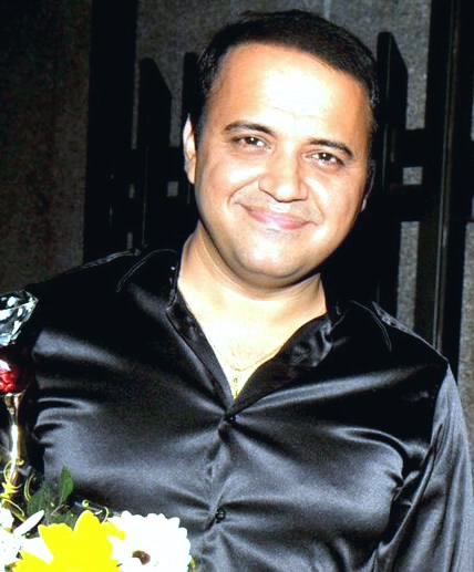 Mandar Chandwadkar at 17th Hira Manek Award